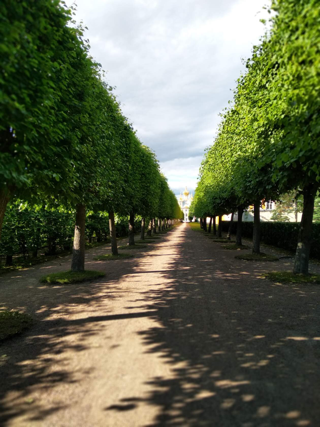 Аллея в Верхнем саду